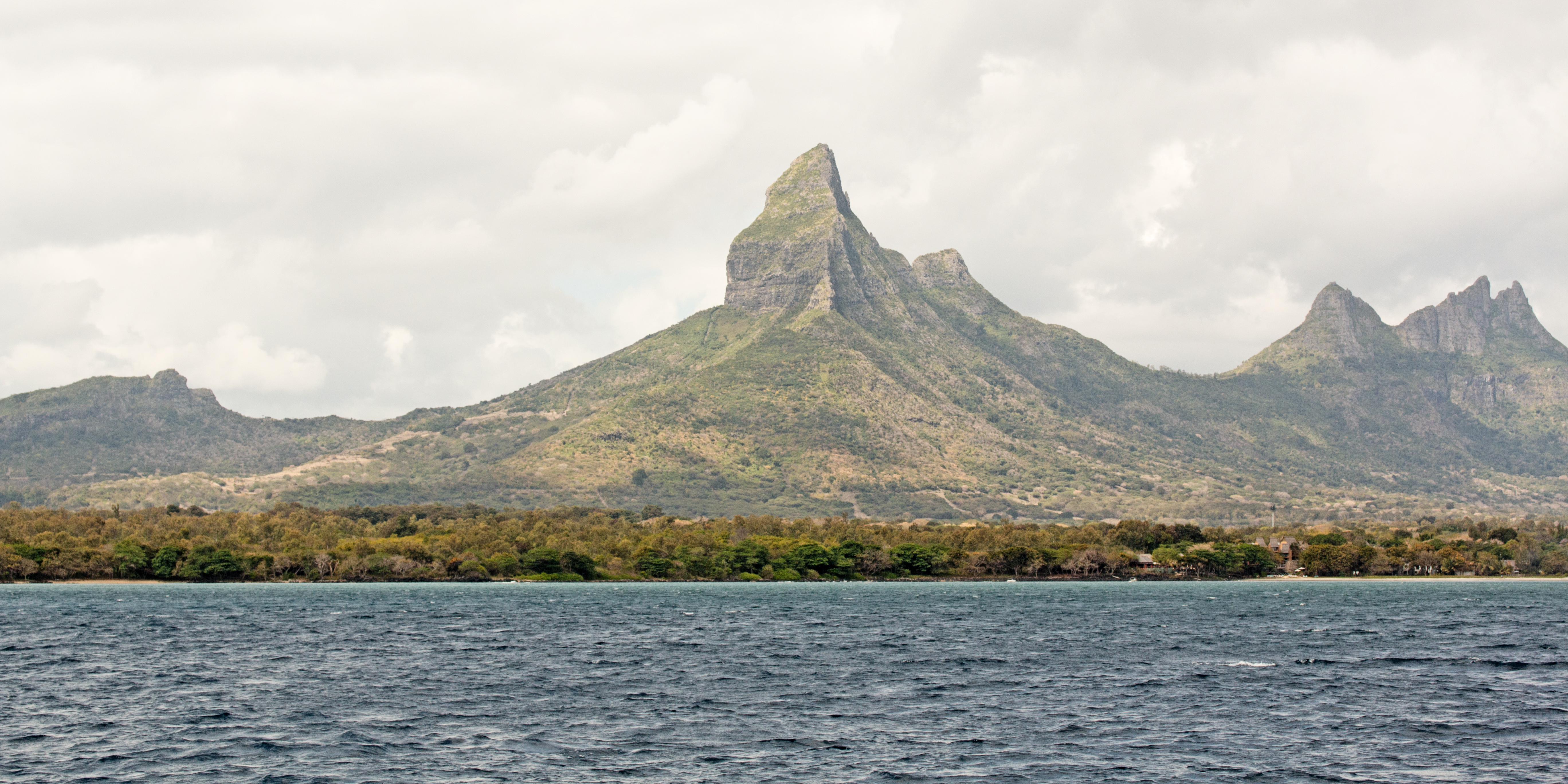 Mont du Rempart